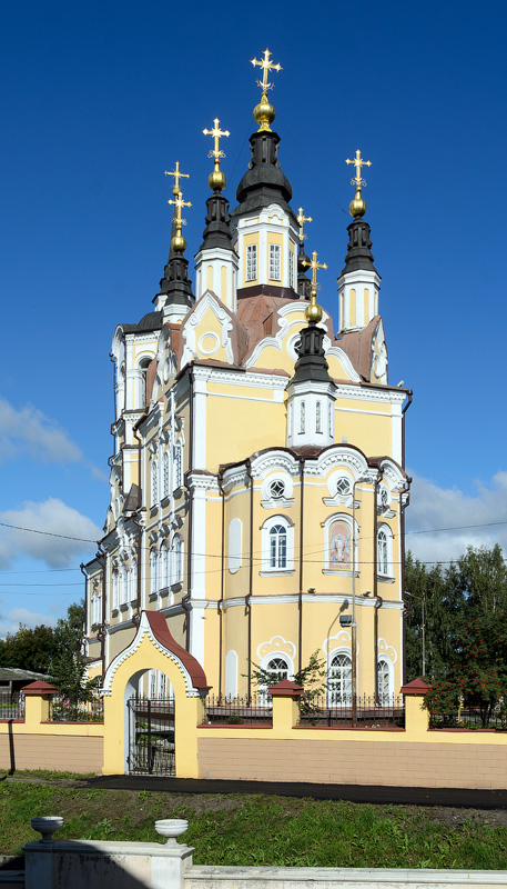 Воскресенская церковь (Томск)